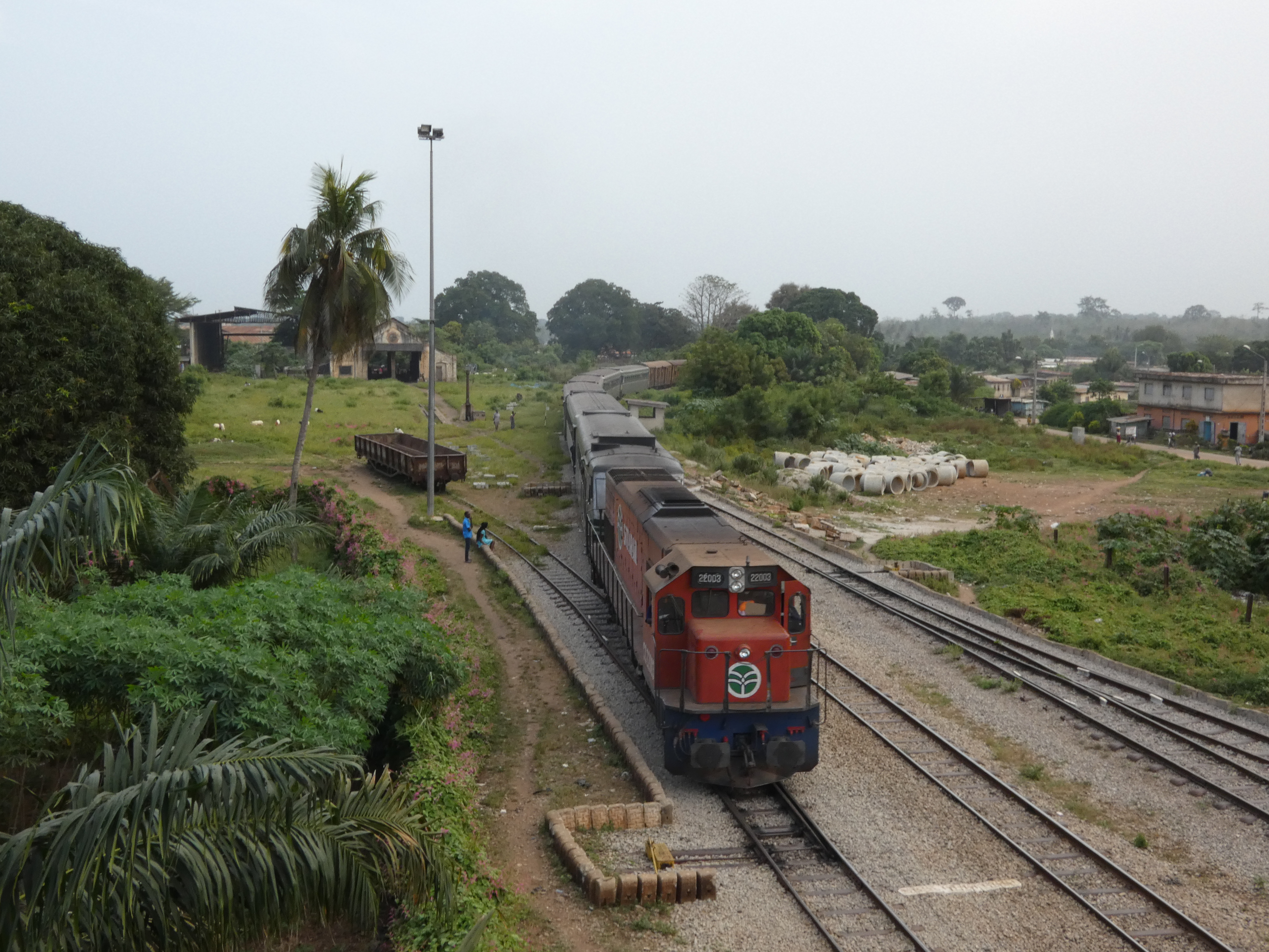 train express 11 bei der Einfahrt in den Bahnhof Dimbokro, Güterwagen hinten angehängt